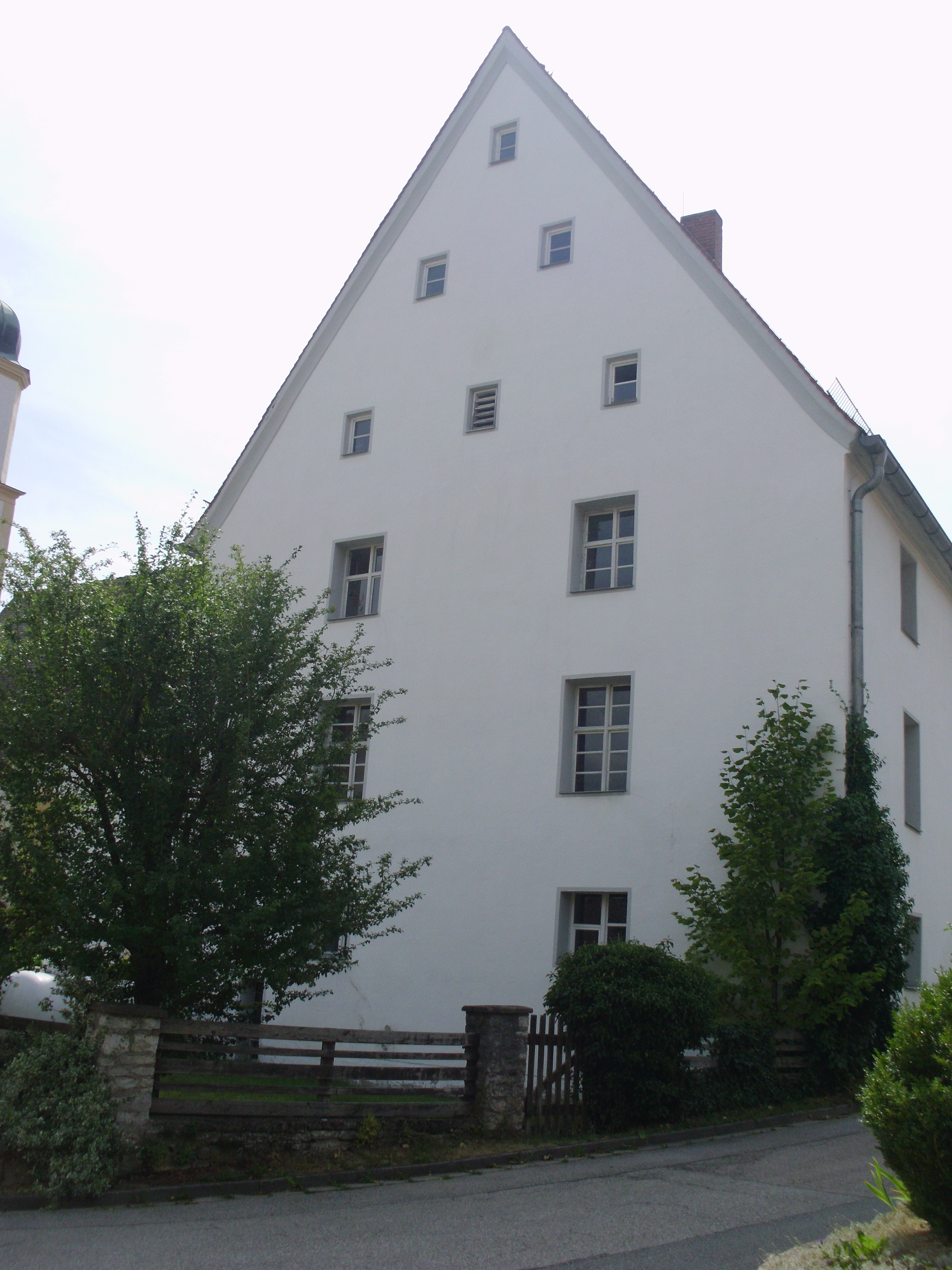 Obermässing, Gemeindeteil von Greding im mittelfränkischen Landkreis Roth, Baudenkmal ehemaliges Kastengebäude